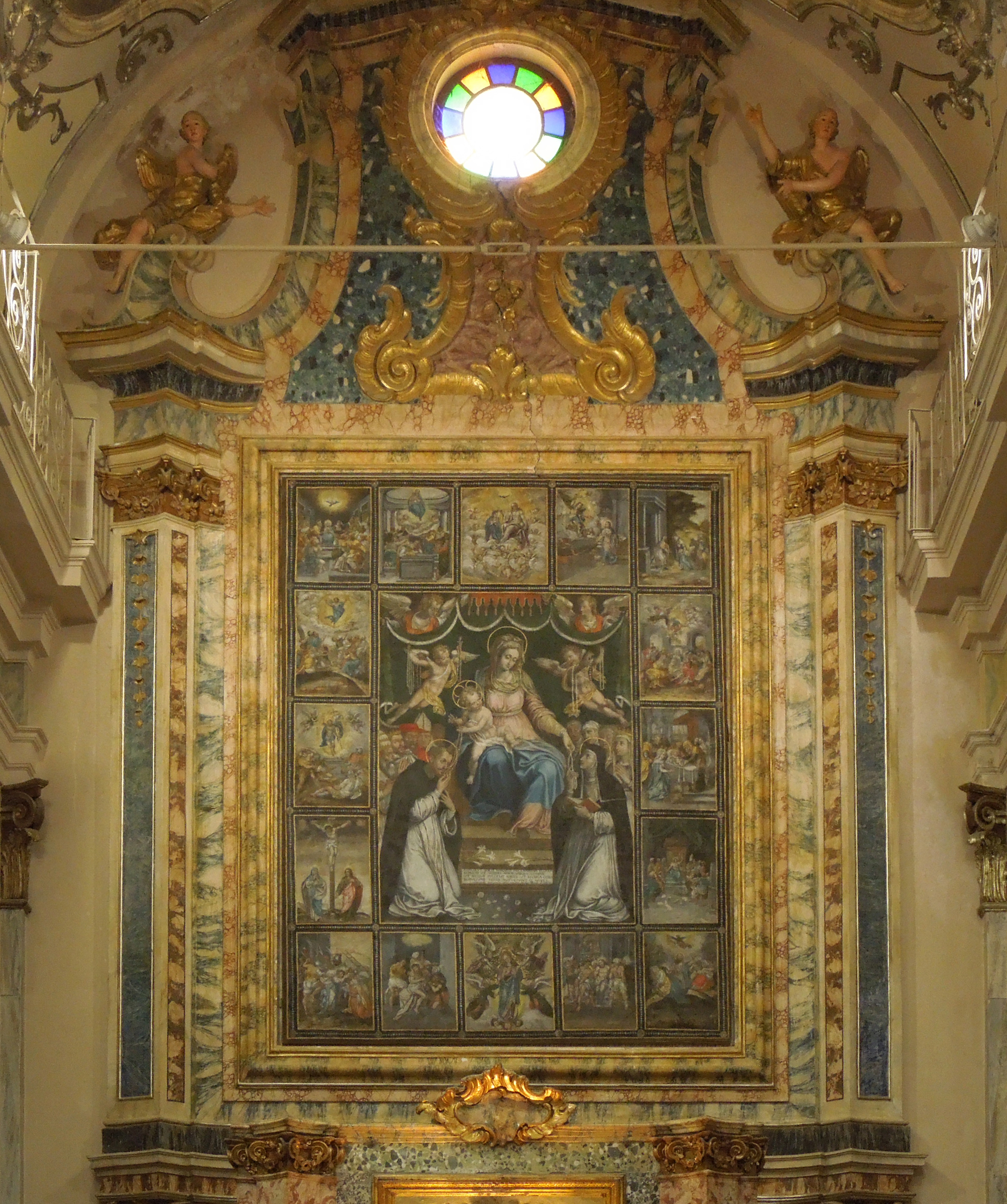 Pala d'altare del Santuario della Madonna dell'Alno che ritrae la Madonna del Rosario contornata da riquadri che illustrano i misteri del Rosario. Il dipinto, datato 1601, è stato eseguito su tela dal maestro Pasquale Richi da Monreale e restaurato nell'anno 2015. Un sentito ringraziamento al parroco di Canzano don Delfino Reggimenti che, accordandomi il permesso, ha consentito lo scatto di questa immagine.